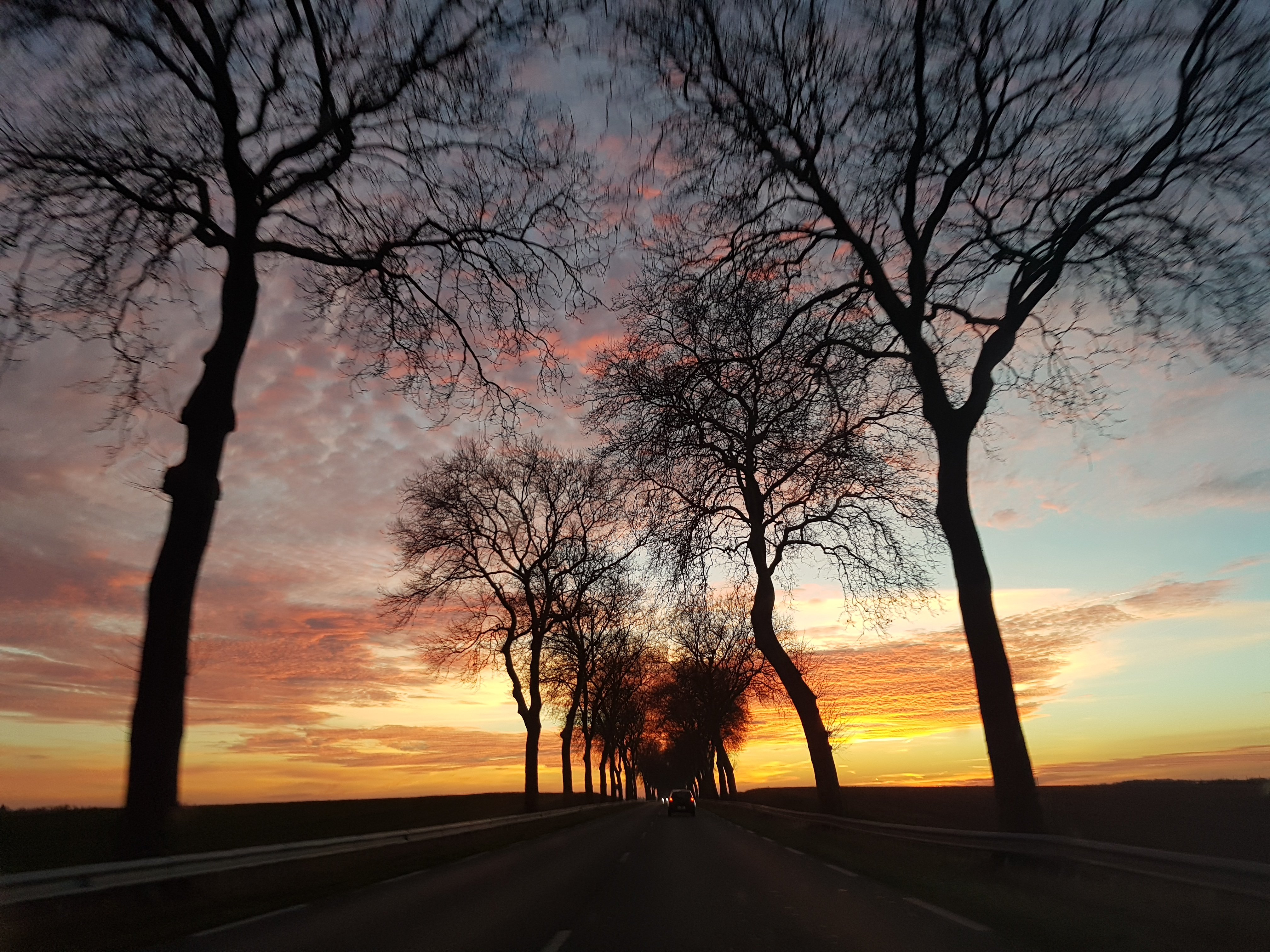 Route bordée d'arbres